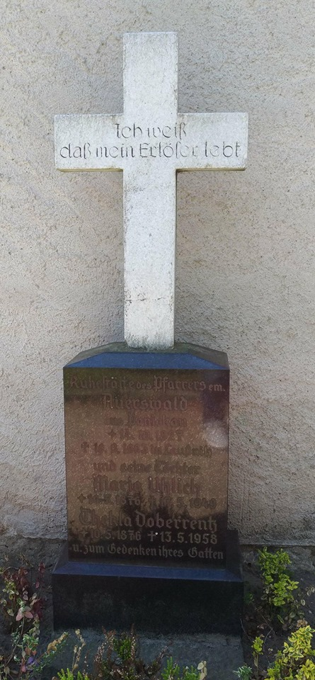 Der Gedenkstein der Ruhestätte des Pfarrers Auerswald aus Ponikau befindet sich auf dem Friedhof Königsbrück, an der nördlichen Seite der Hospitalkirche.